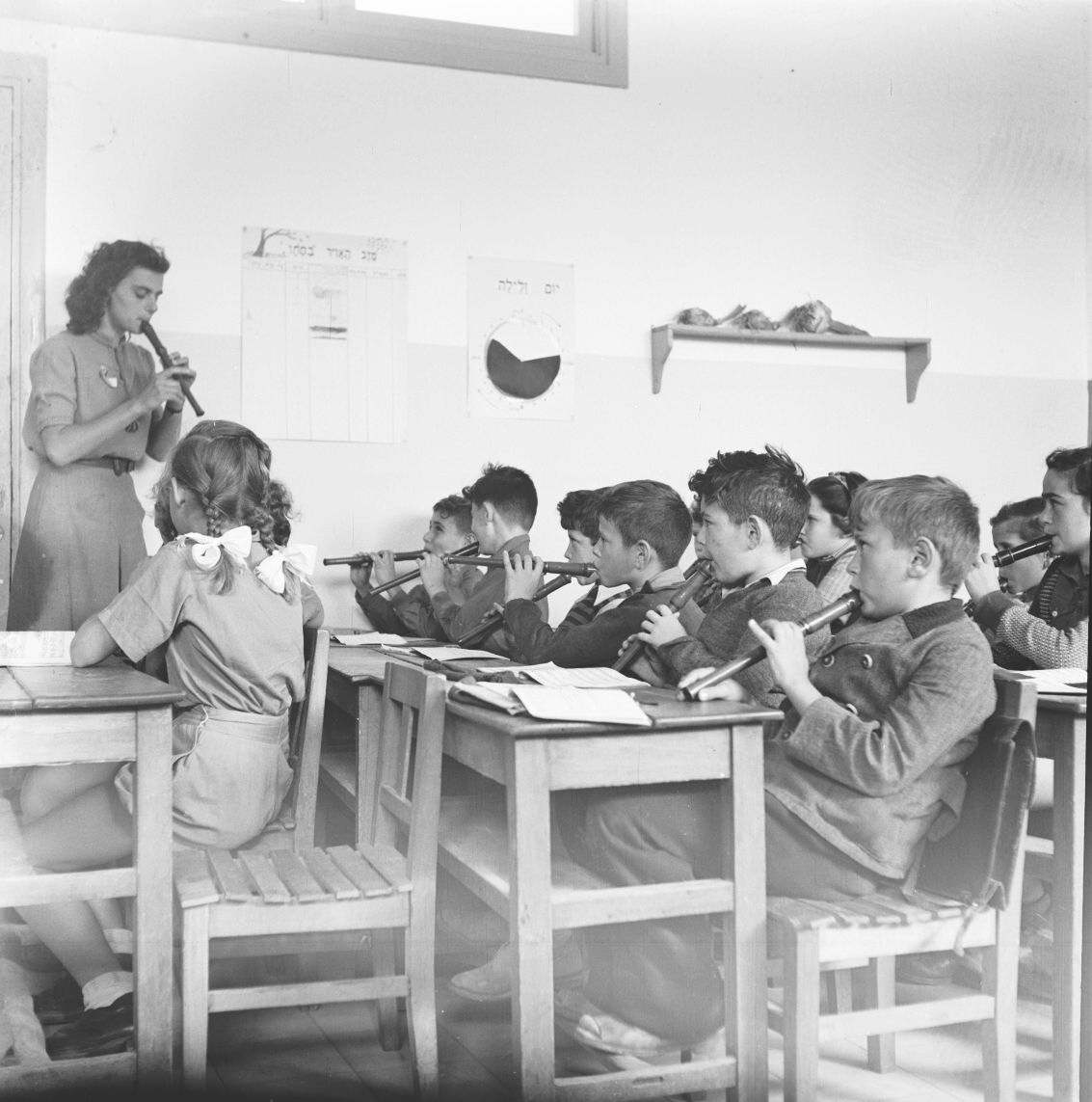 אוסף צילומים של הצלם זולטן קלוגר טווח מספרי התשלילים 26048 - 26085: שיעור חלילית בבית ספר עממי בתל אביב